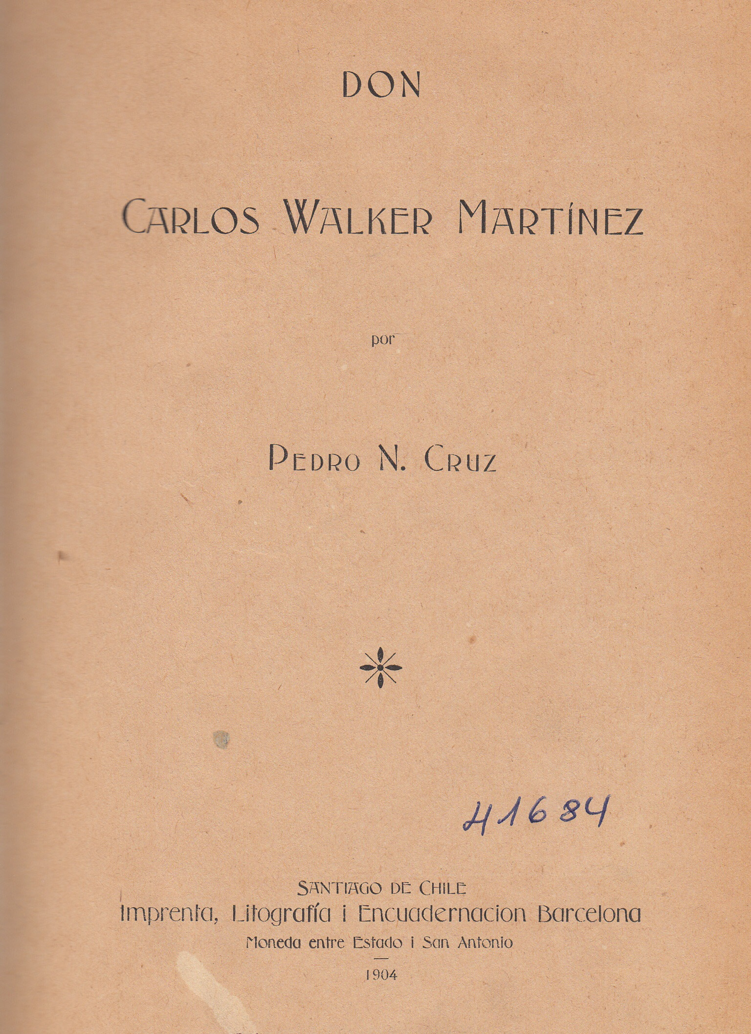 Portada de libro Bibliográfico de Carlos Walker Martínez, publicado en 1904, autor Pedro Nolasco Cruz Vergara